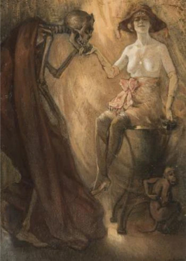 De Handkus